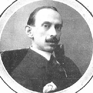 Fotografía del político y periodista español Manuel Delgado Barreto publicada en 1915 tras haber dado una conferencia sobre «La prensa como elemento de cultura, como órgano de opinión y como instrumento de gobierno».